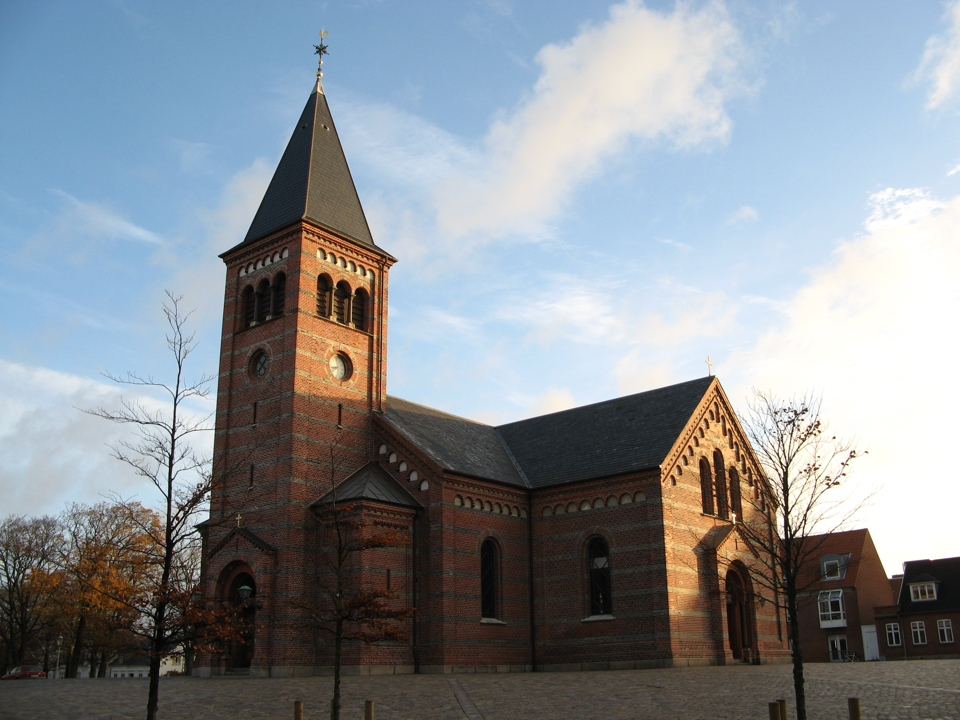 Vor Frelser kirke, Vor Frelser sogn, Esbjerg kommune (former: Skads Herred, Ribe Amt). Kirken set fra sydvest